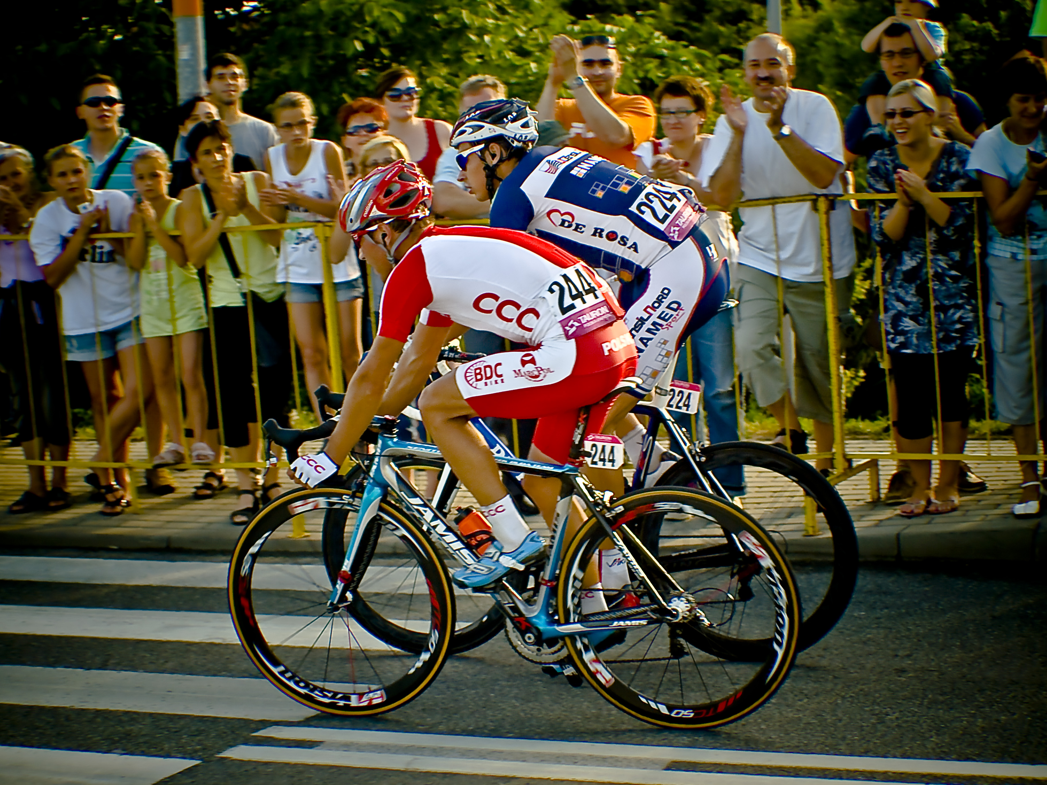 Damian Walczak (nr 244), Adrian Kurek (nr 224)